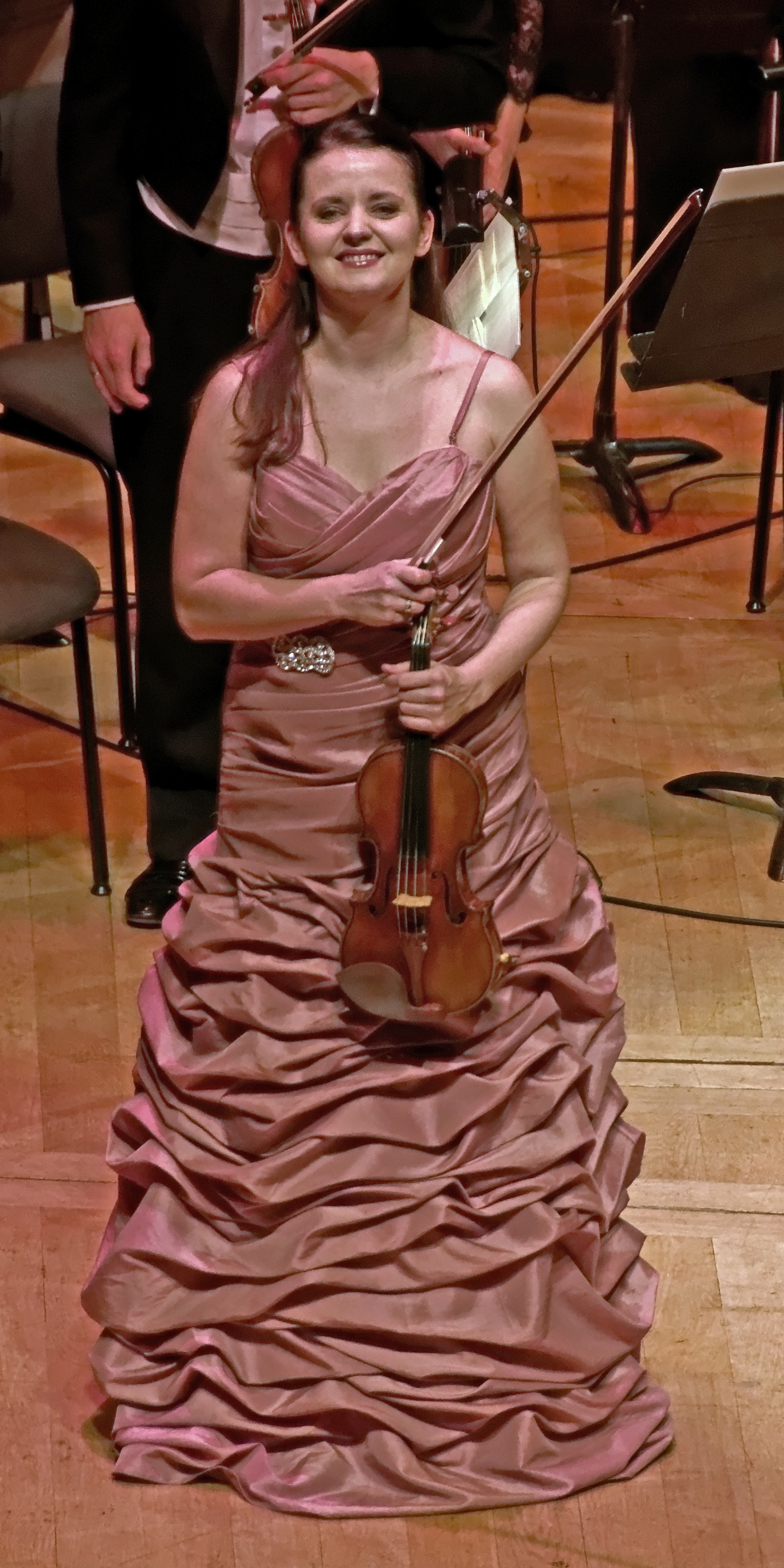 Baiba Skride lors du concert de Nouvel An, sous la direction de Yutaka Sado. Auditorium de Lyon La Part Dieu, France